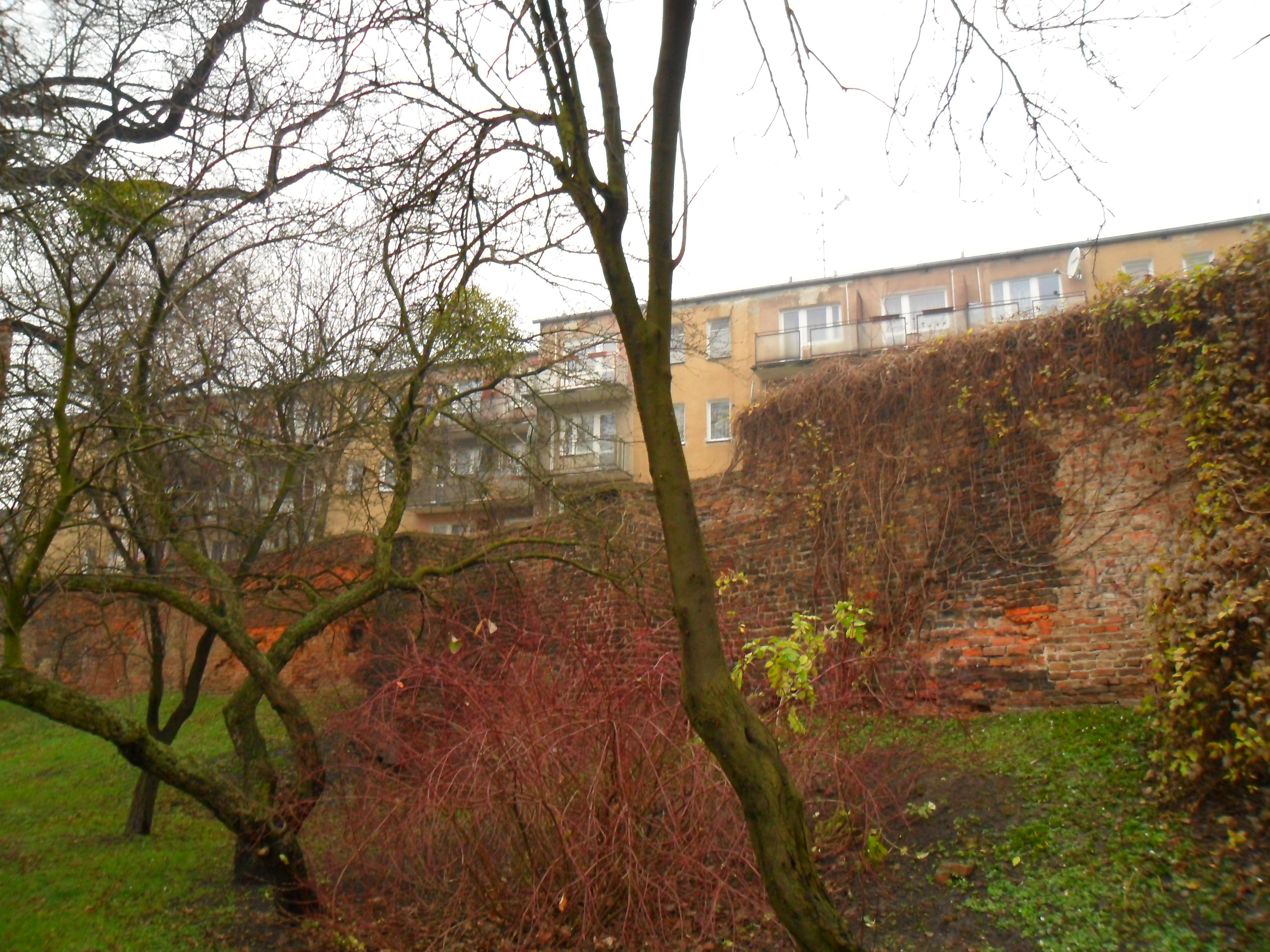 Fragmenty murów miejskich przy ulicy Drzymały w Raciborzu